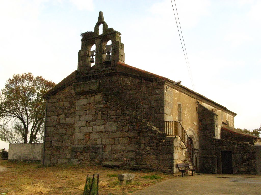 Yllesia de San Xuan Degolláu